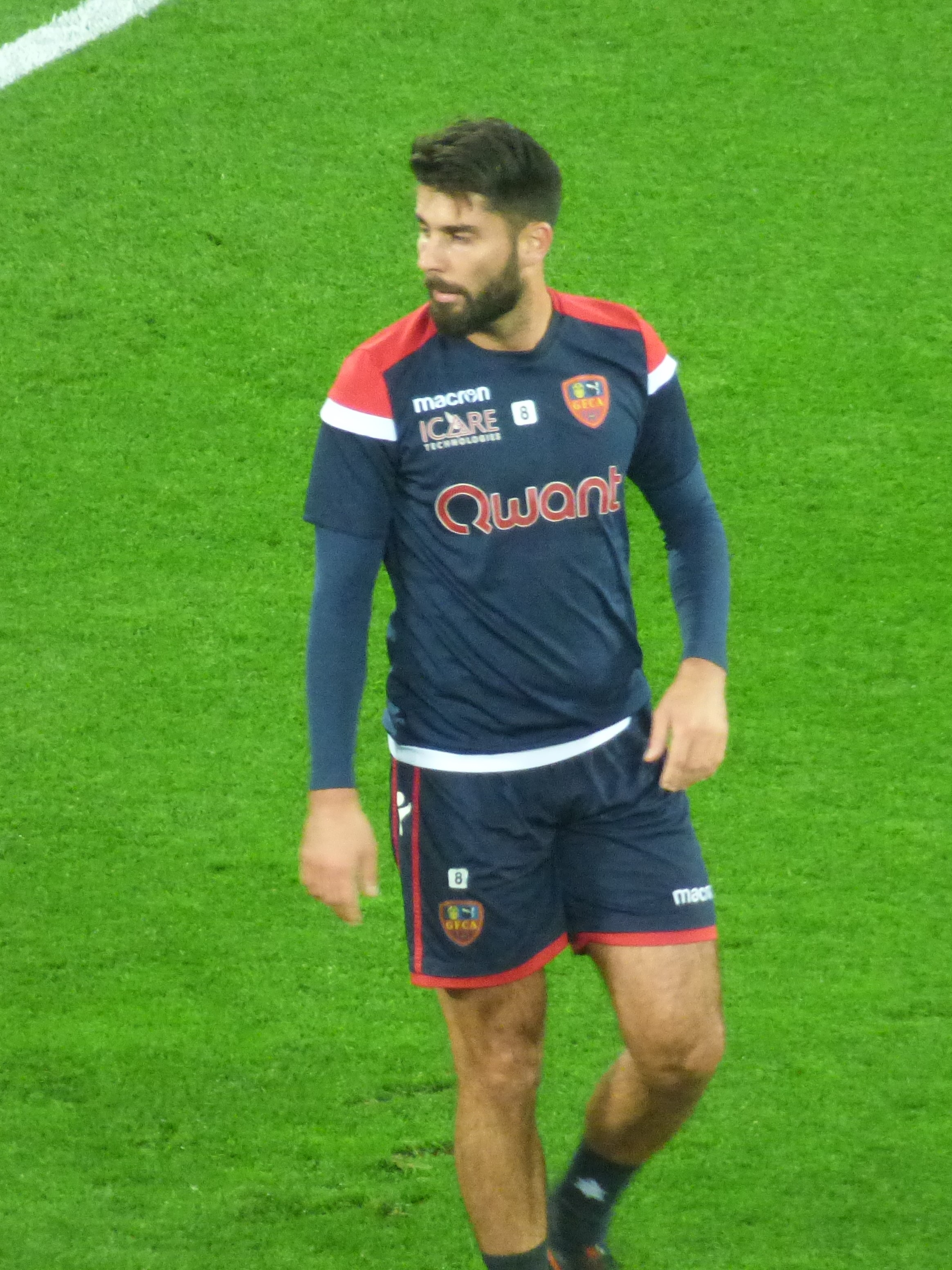 Jimmy Roye avant le match RC Lens / GFC Ajaccio, comptant pour la onzième journée du championnat de France de Ligue 2 2018-2019 au Stade Bollaert-Delelis, le 22 octobre 2018.